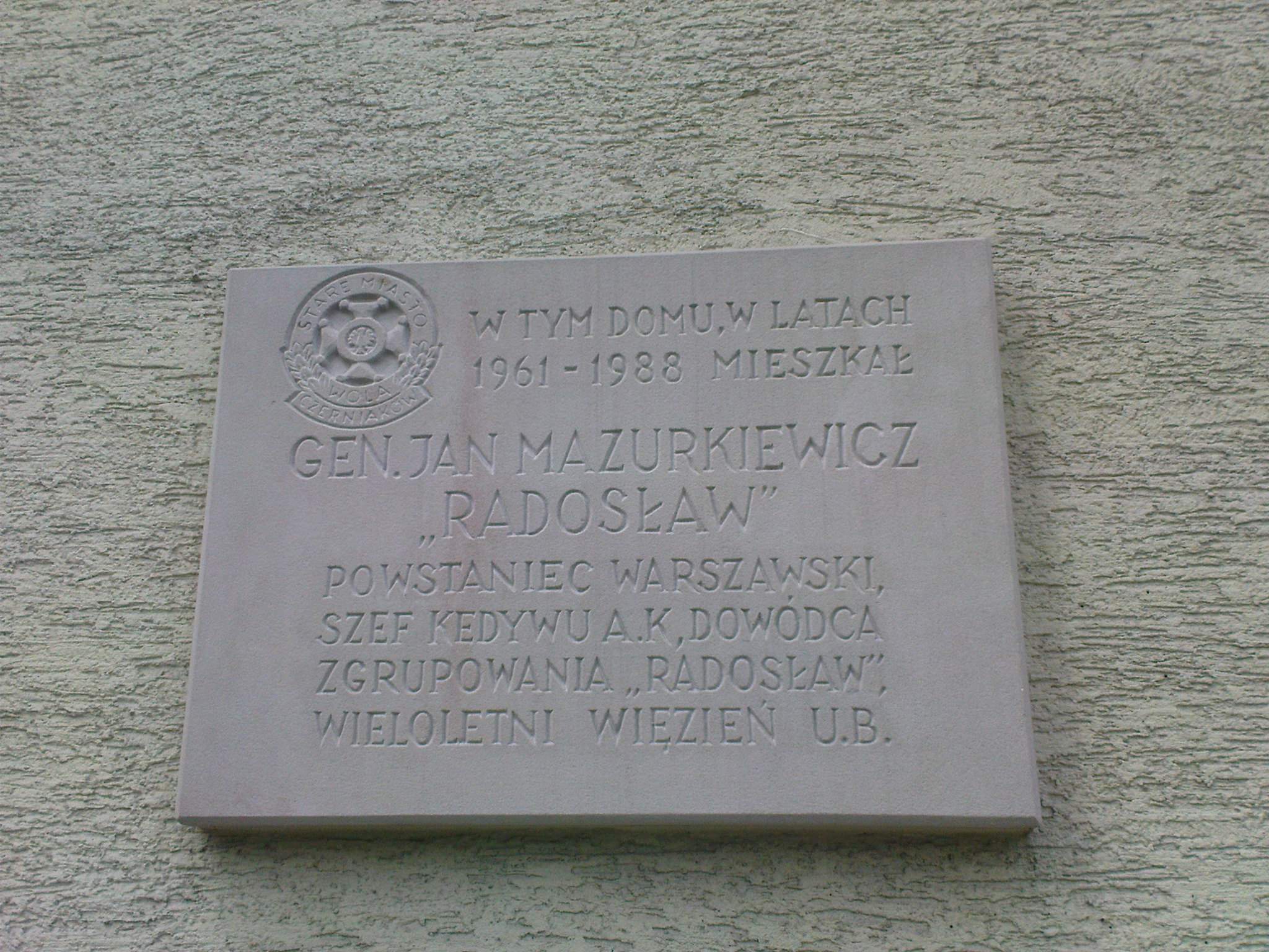 Tablica na elewacji budynku pod adresem Madalińskiego 42 w Warszawie informuje, że w tym budynku mieszkał Generał Jan Mazurkiewicz "Radosław" - Powstaniec Warszawski, szef Kedywu Armii Krajowej Zgrupowania "Radosław" wieloletni wiezień UB